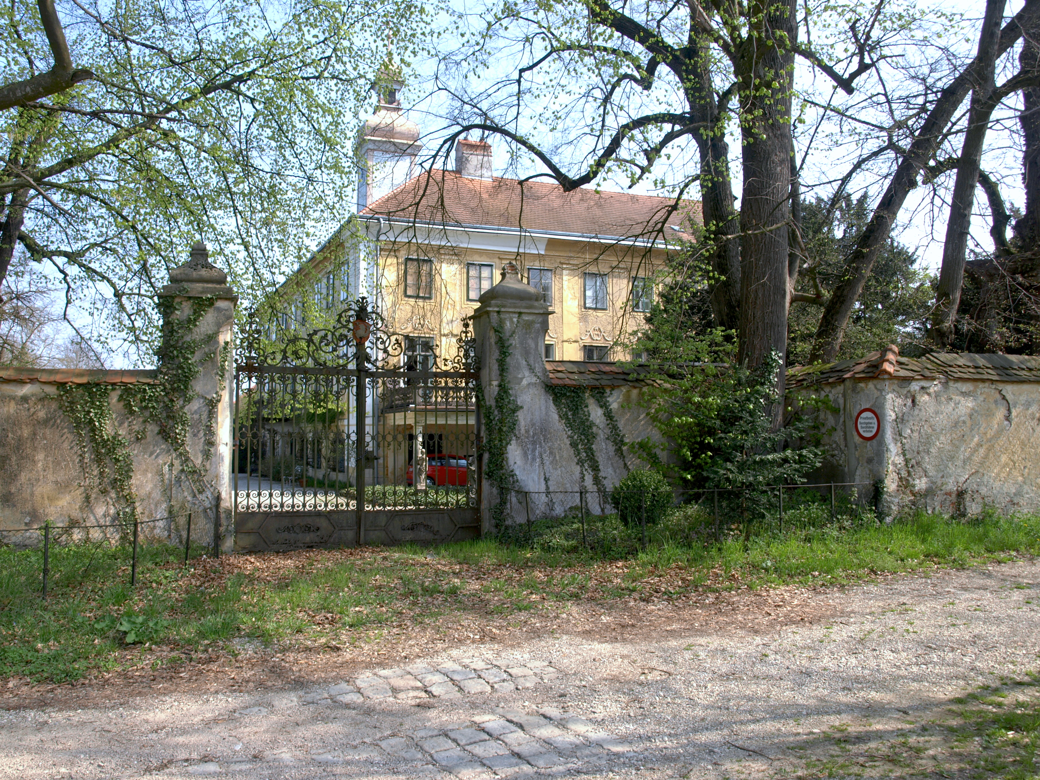 Schlossanlage Dorf an der Enns